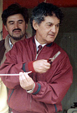 Concejal Alcalde y politico de Quellon